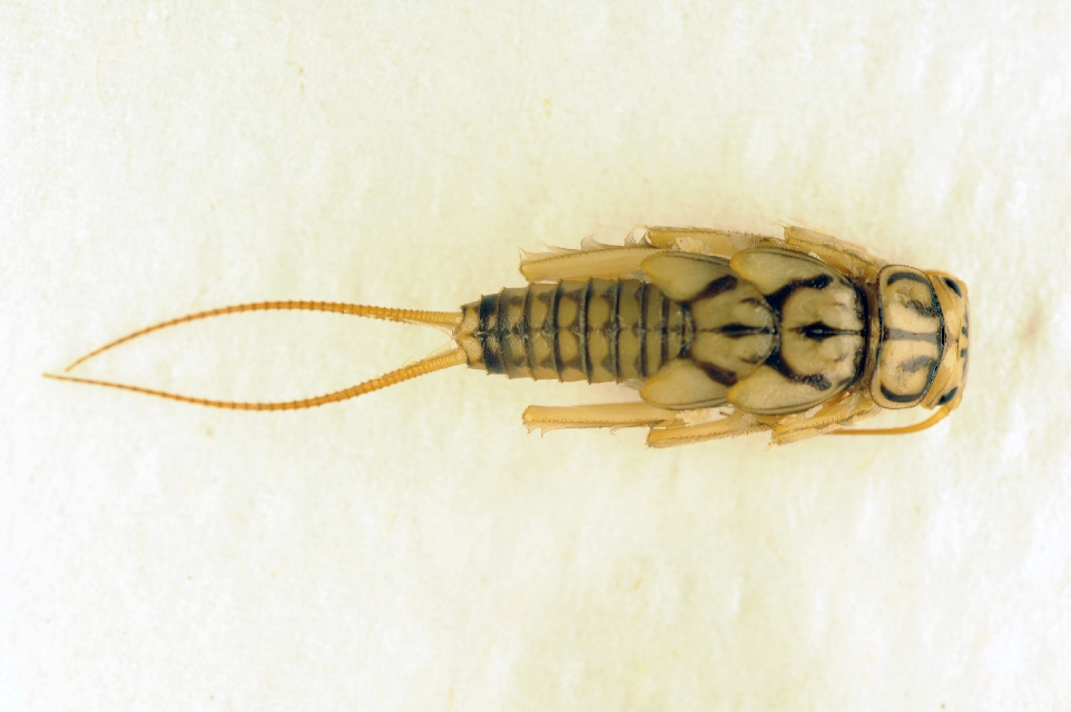 Perla marginata nymph